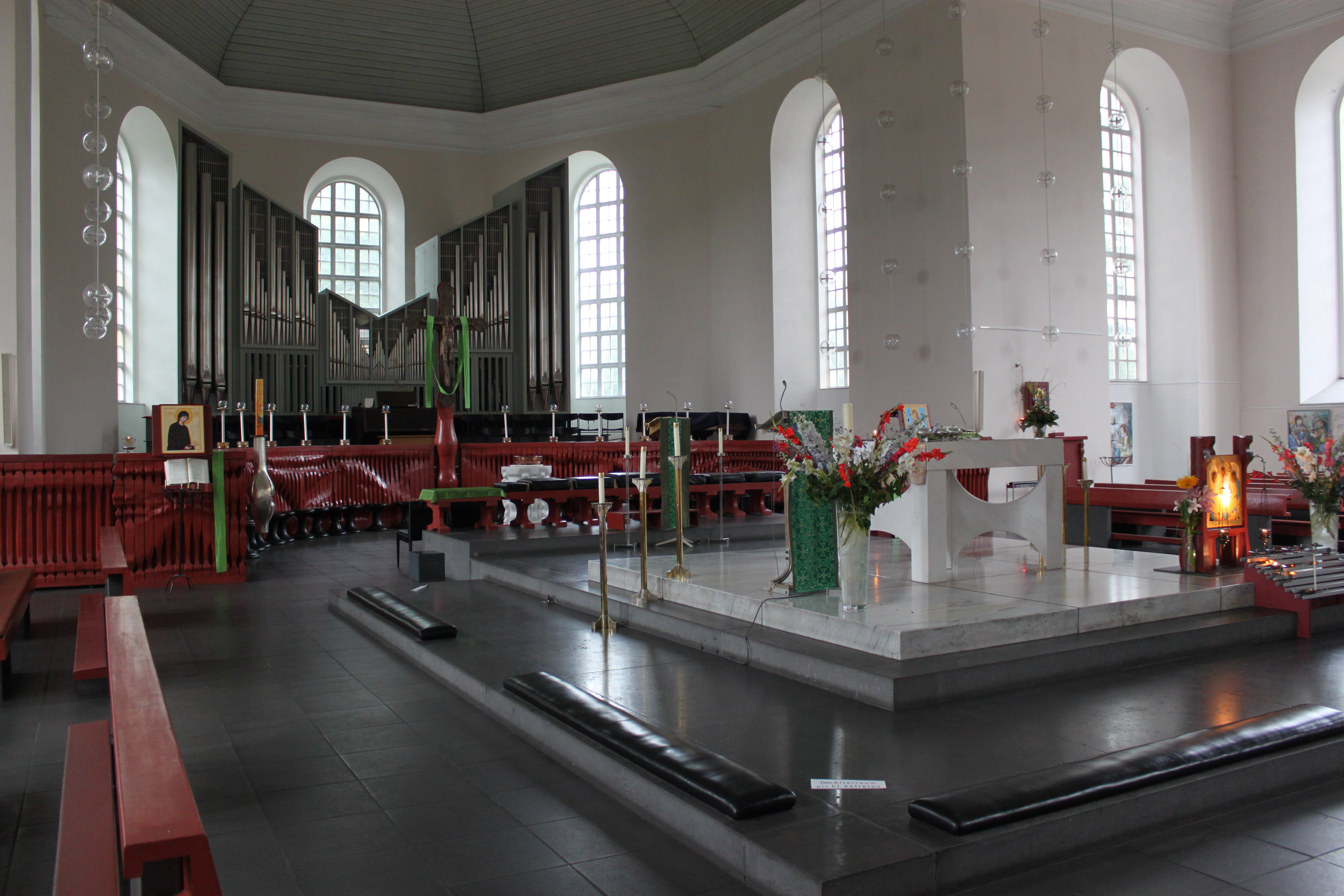 Altar und Orgel der Hauptkirche St. Trinitatis in Hamburg-Altona